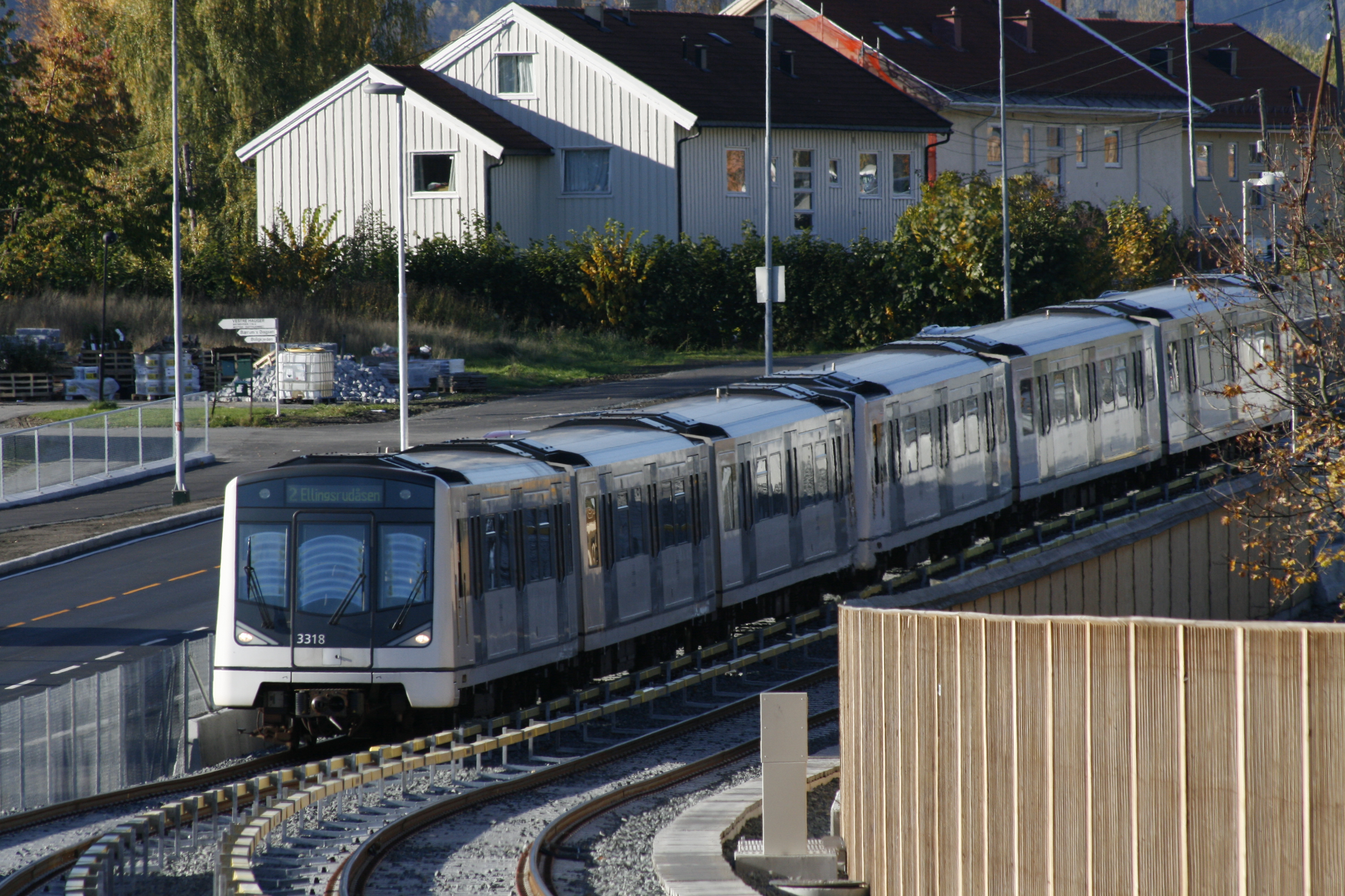 Tog på Kolsåsbanen mellom Hauger og Kolsås stasjoner oktober 2014 etter gjenåpningen.